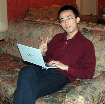 Foto del Grande Maestro di scacchi Ni Hua al 51° torneo di Capodanno di Reggio Emilia